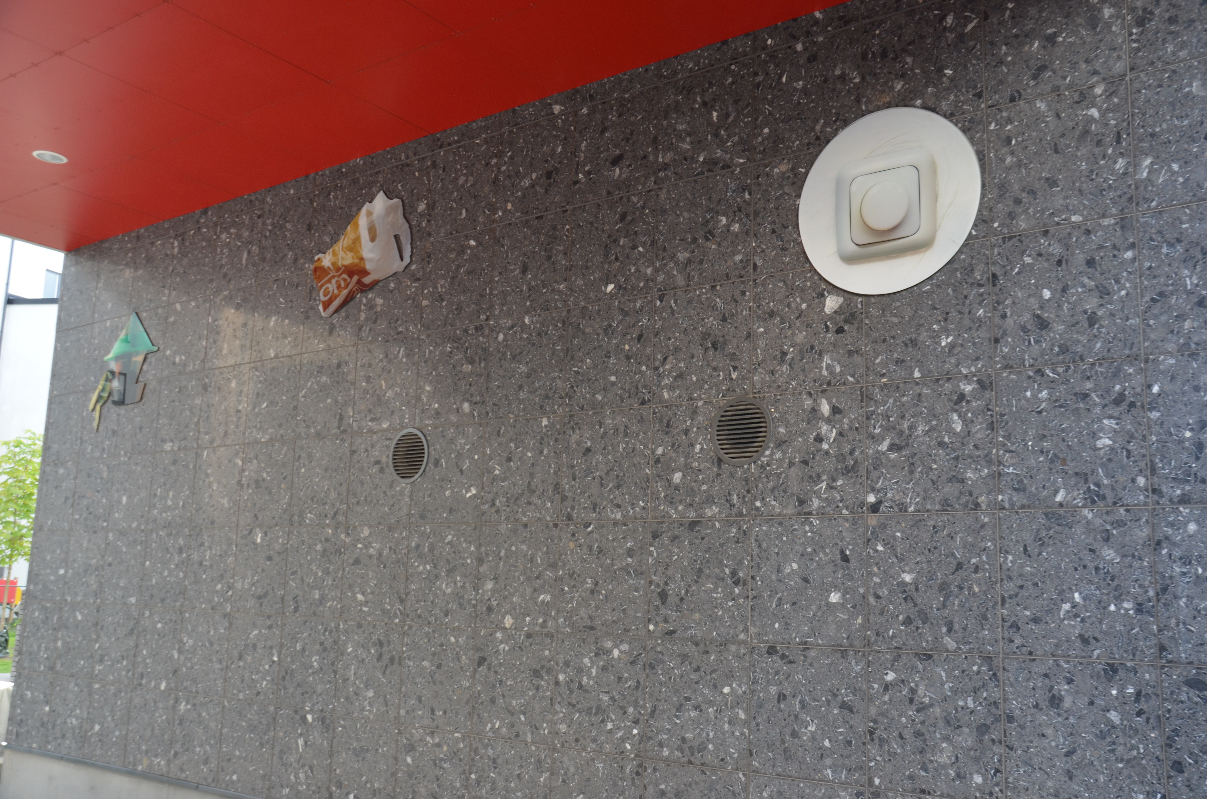 Resa i hemmets mikrokosmos av Mia Andrée, detalj. Väggutsmyckning i portgången till Sjöviksvägen 52-54 i Mariedal i Liljeholmen i Stockholm, 2010-11.